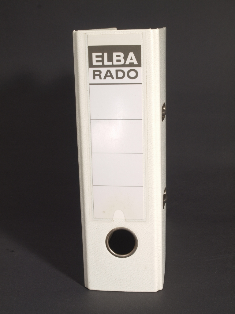 Elba Aktenordner für das Papierformat A5 mit weißer Kunststoffoberfläche. ELBA Ordnerfabrik Wuppertal